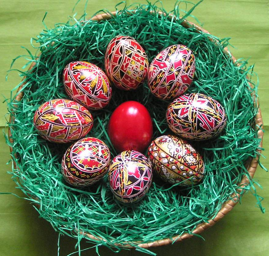 Ein rot gefärbtes und acht mit Wachs und Farben in traditionellem ukrainischen Stil dekorierte Eier.